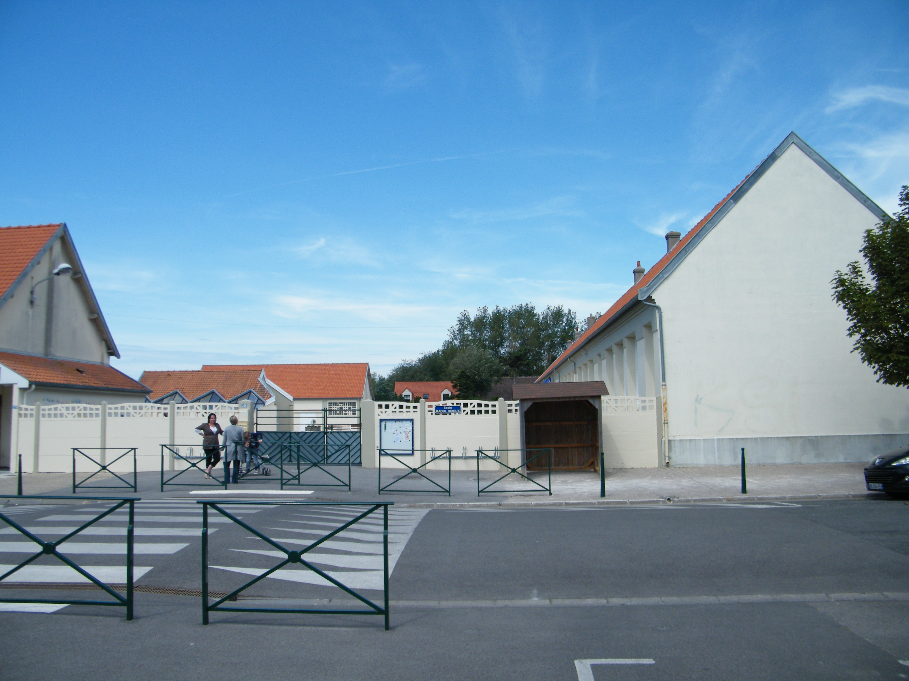 Fort-Mahon-Plage, école primaire Raoul Ridoux.